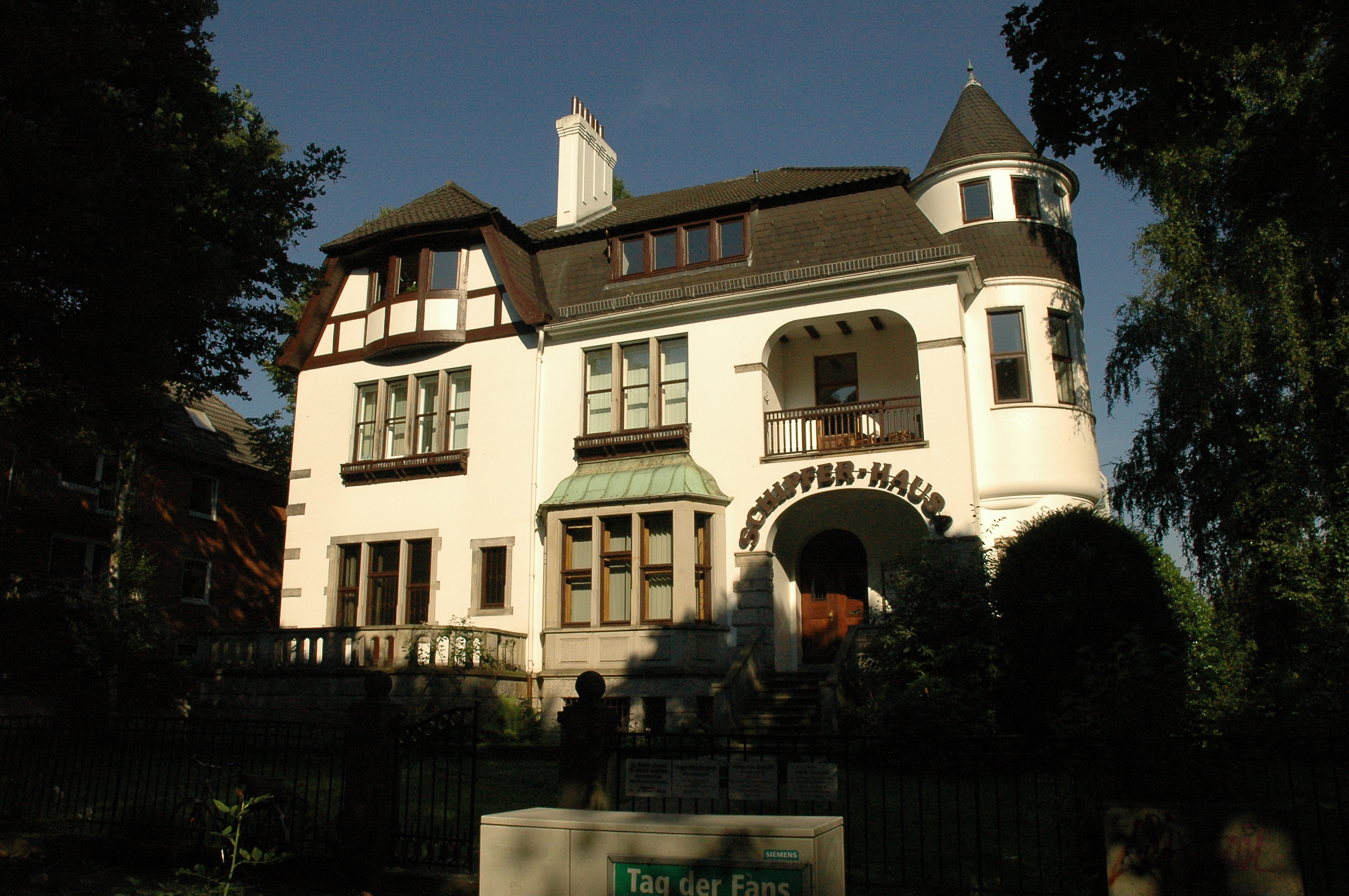 Villa Ahlers, Parkallee 117 von Gildemeister & Sunkel